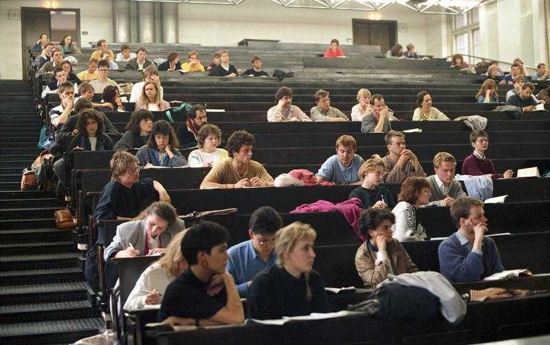 Juni 1988 Heidelberg Universität Vorlesung (Hörsaal)